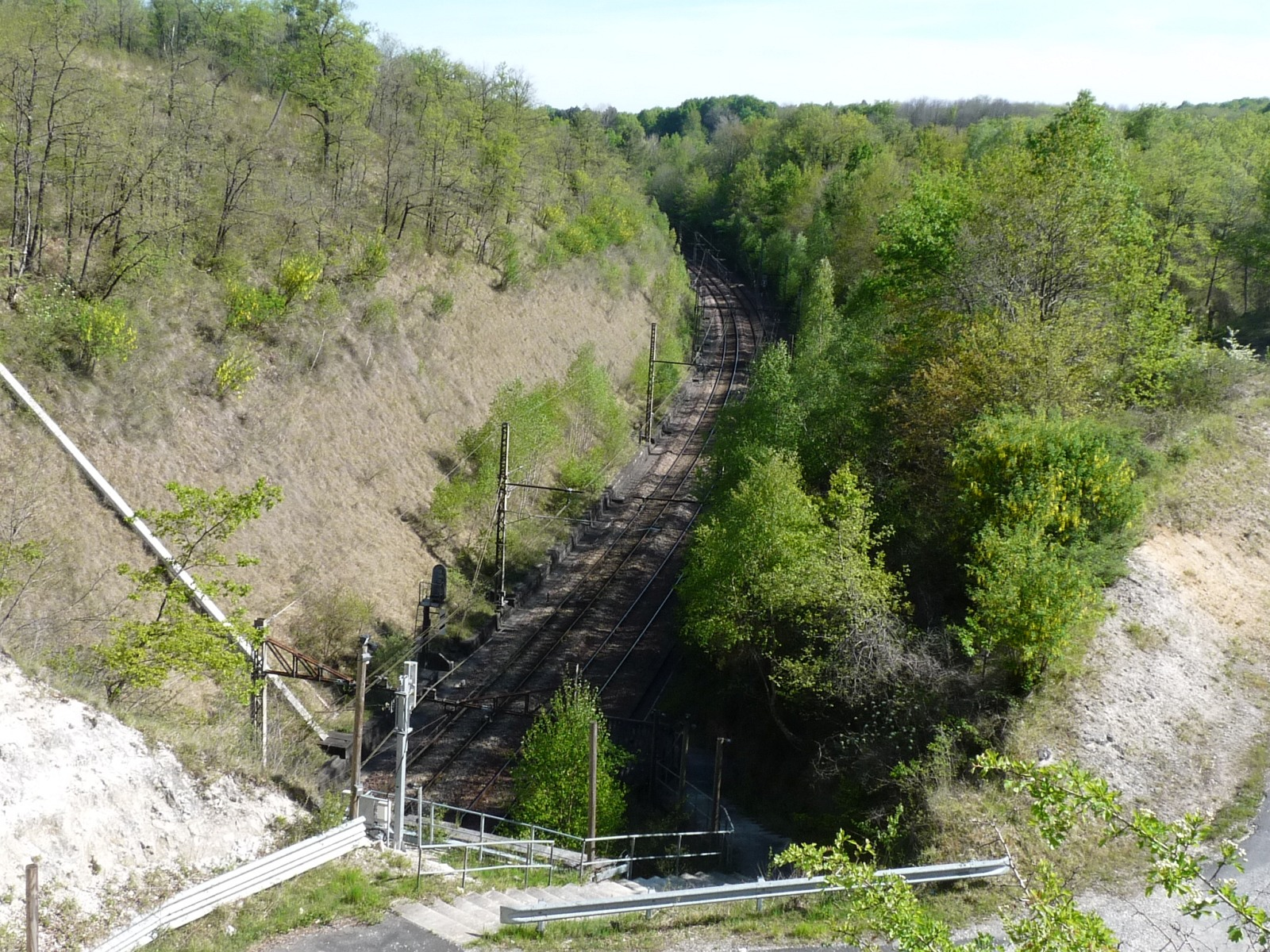 Entrée sud du tunnel de Livernant, voie ferrée Paris-Bordeaux, Charmant, Charente, France